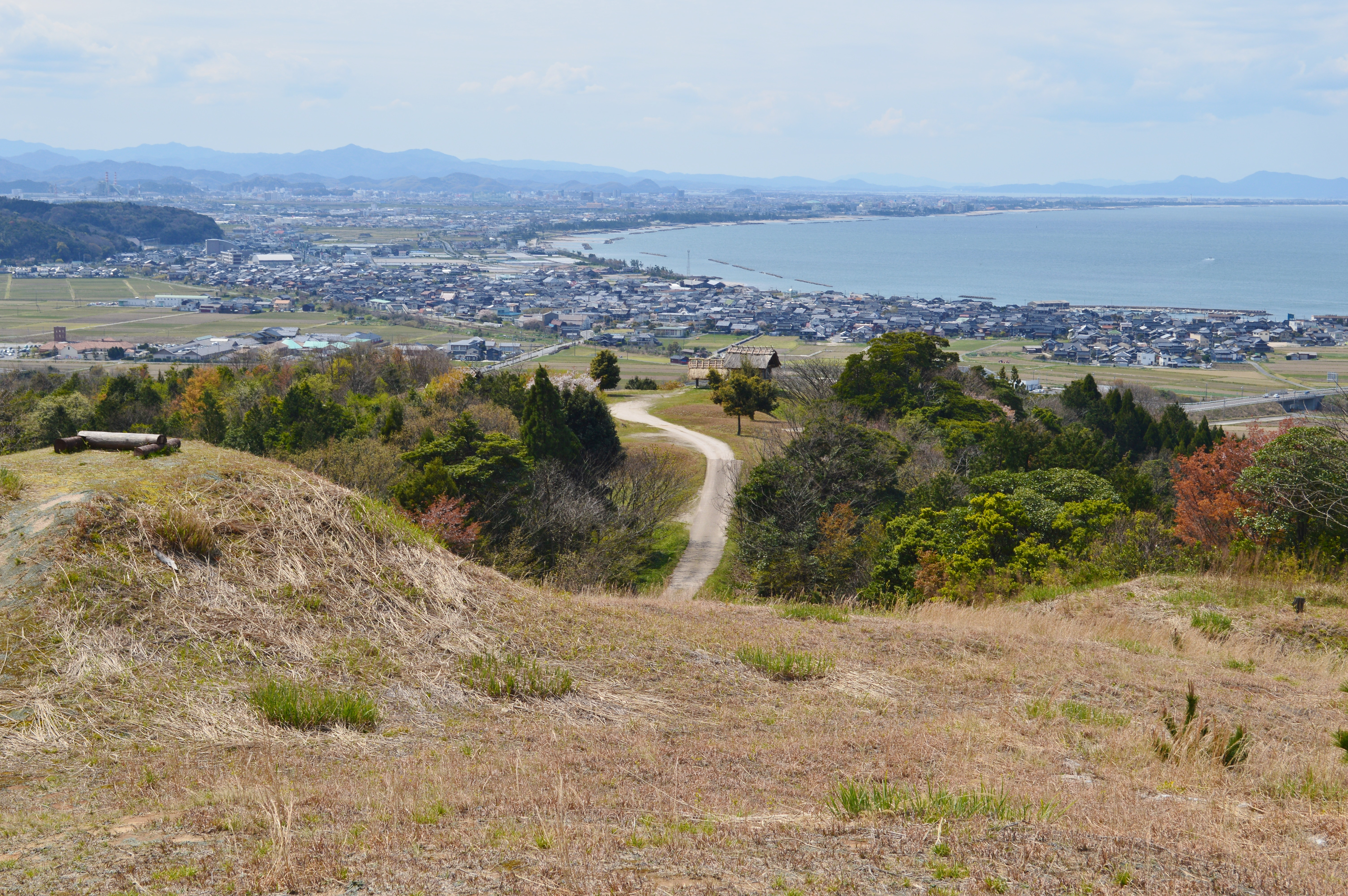 妻木晩田遺跡 洞ノ原地区西側丘陵 遠景 Nikon D3200